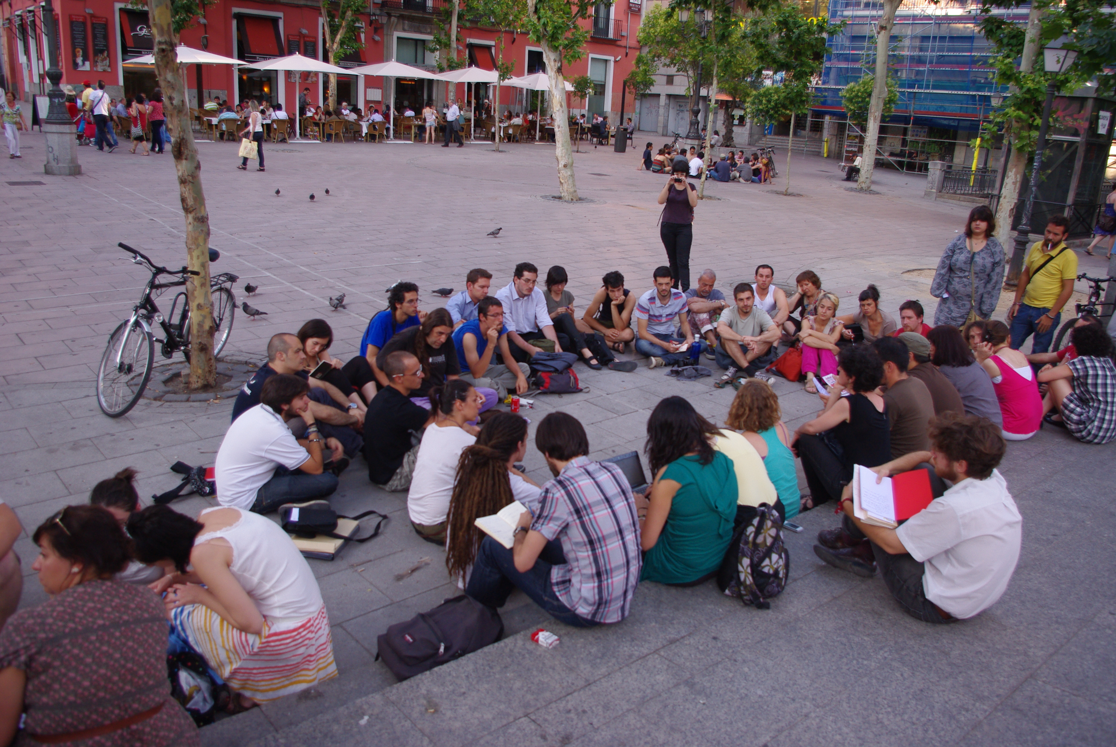 Movimiento 15M. Las comisiones de trabajo continúan con su actividad.